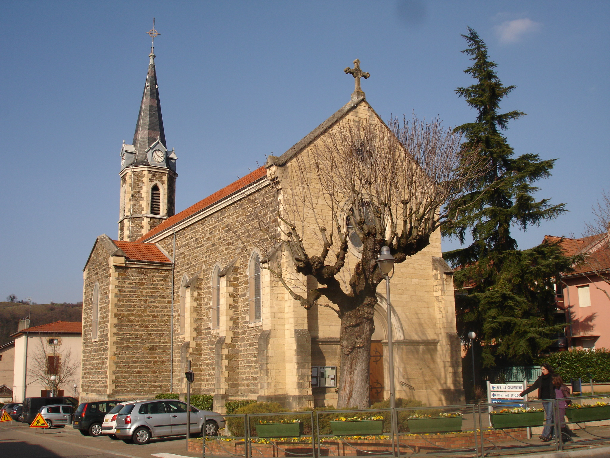 Sérézin-du-Rhône : l'église vue générale